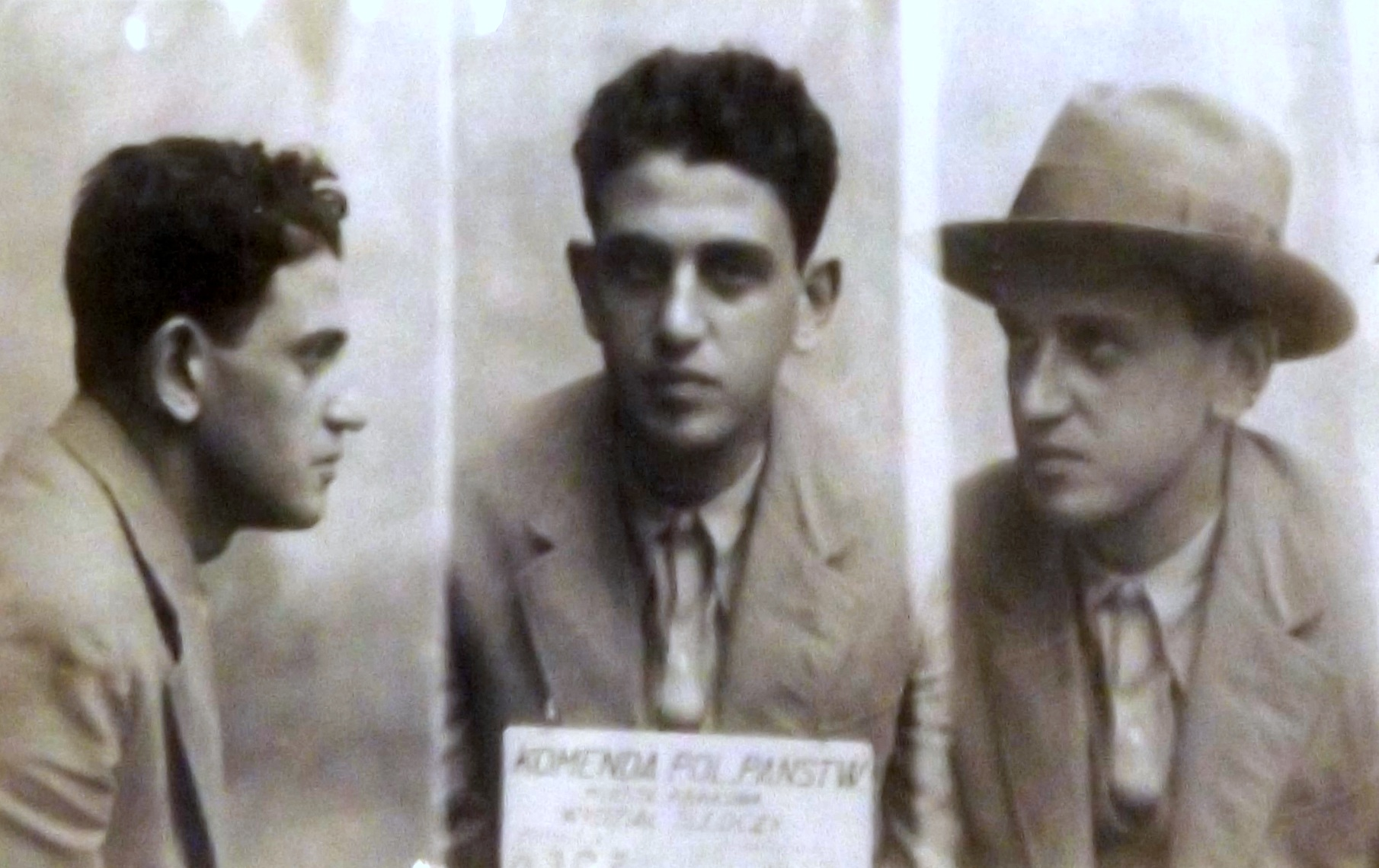 Działacz komunistyczny Oskar Karliner - zdjęcie pochodzi z akt procesu toczącego się przed Sądem Okręgowym w Krakowie (tzw. proces wojskówki KPP)